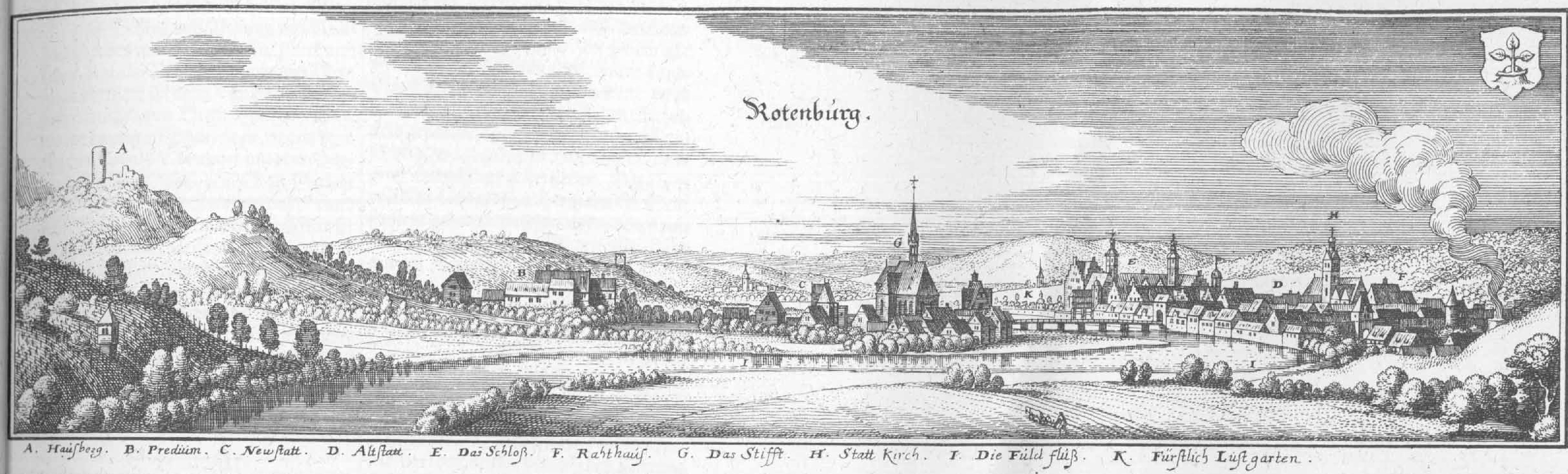 Dies ist Ausschnitt eines Scan des historischen Buches